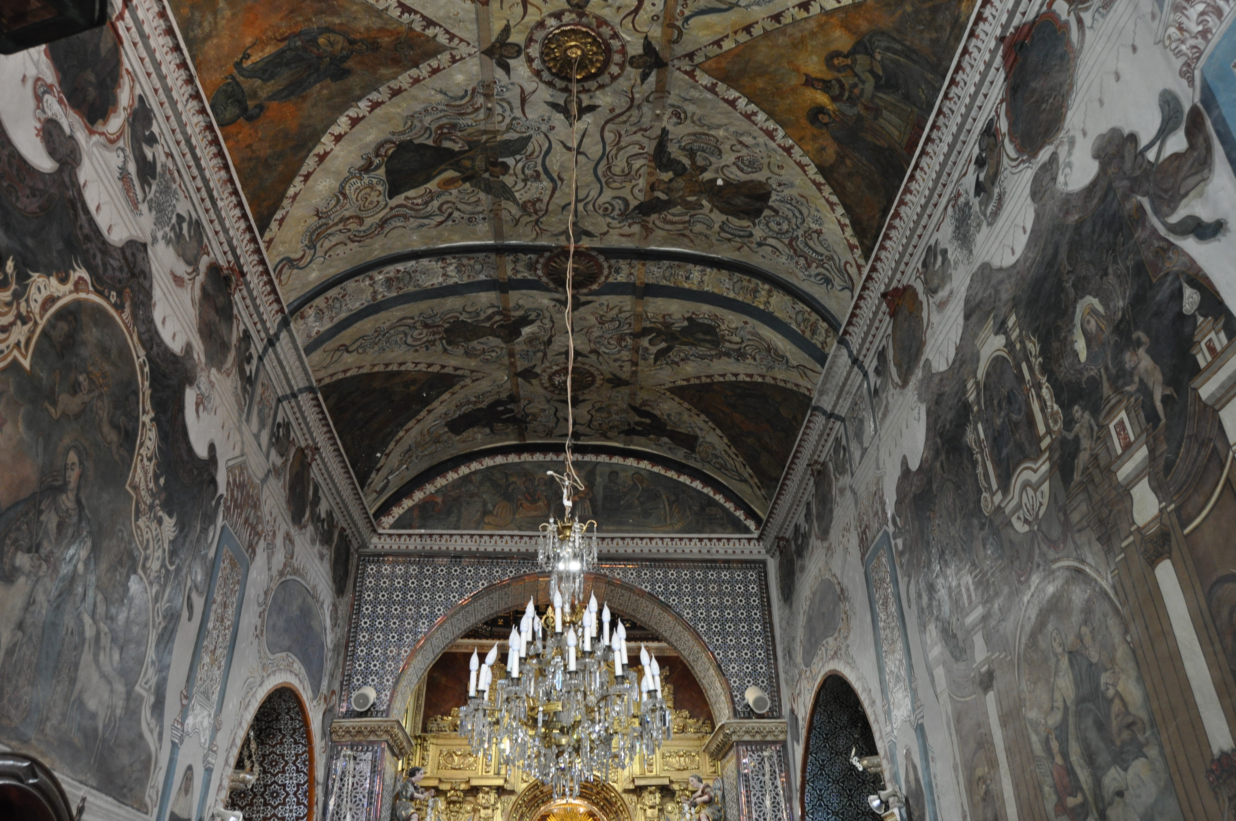 Santuario de Nuestra Señora de los Remedios (Olvera) - 005